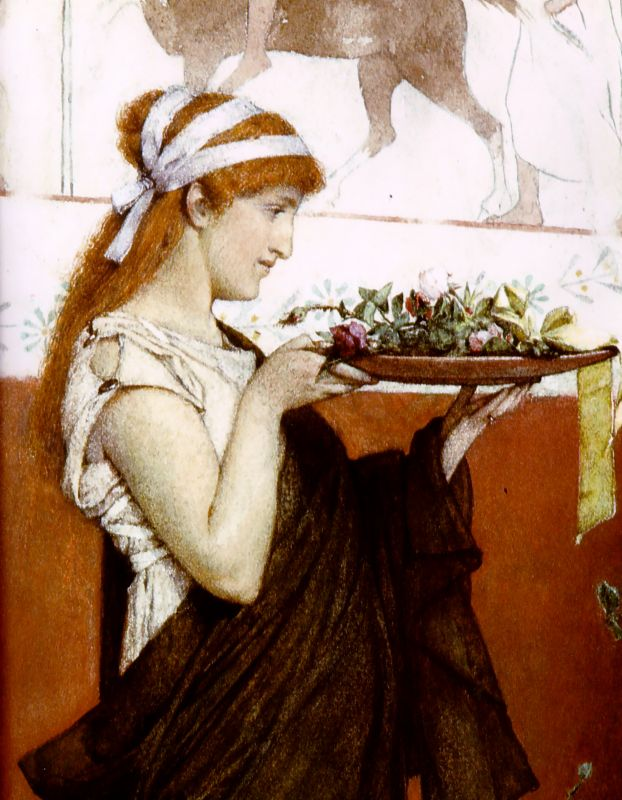 Offerta votiva, particolare